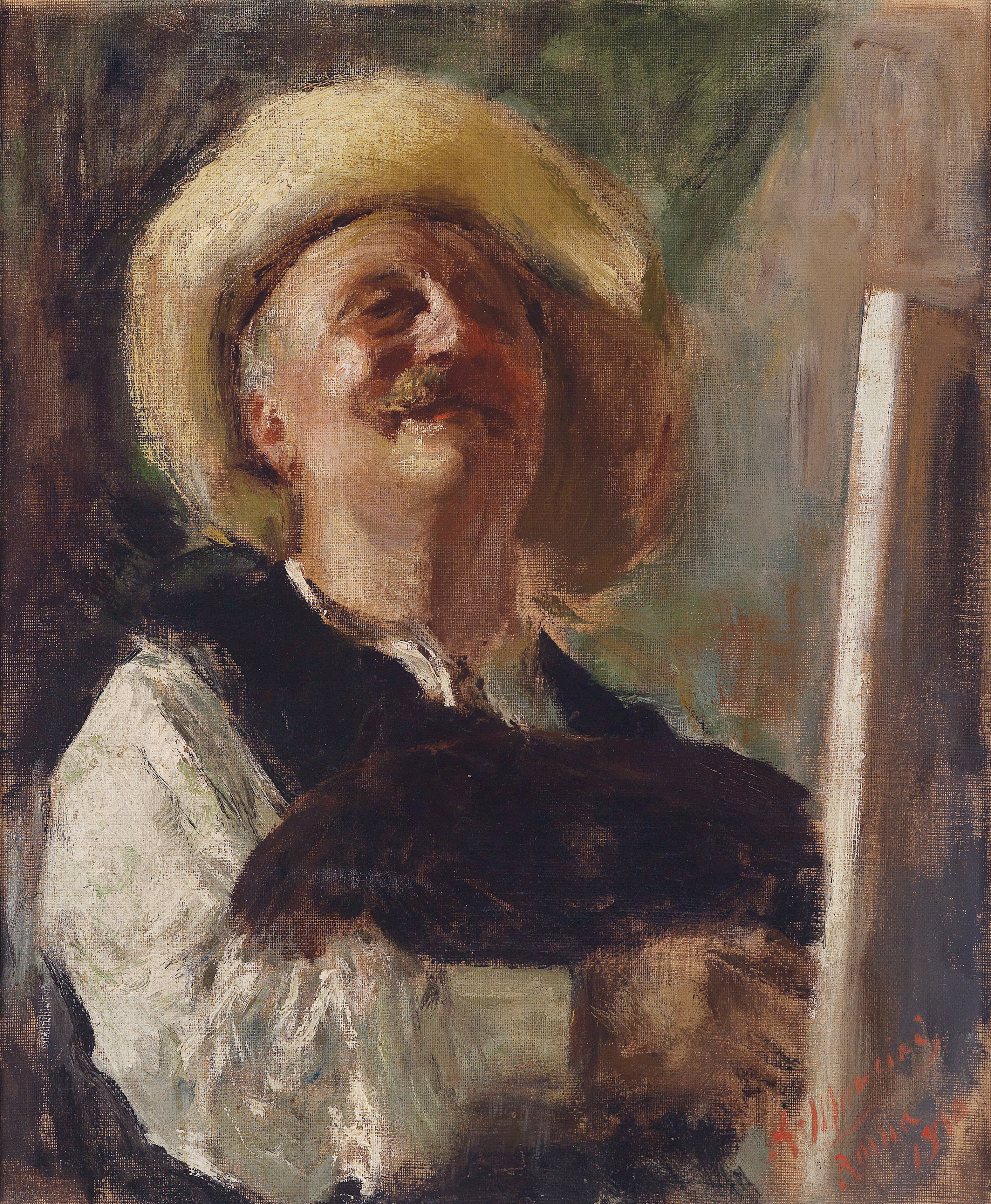 double-sided self-portrait